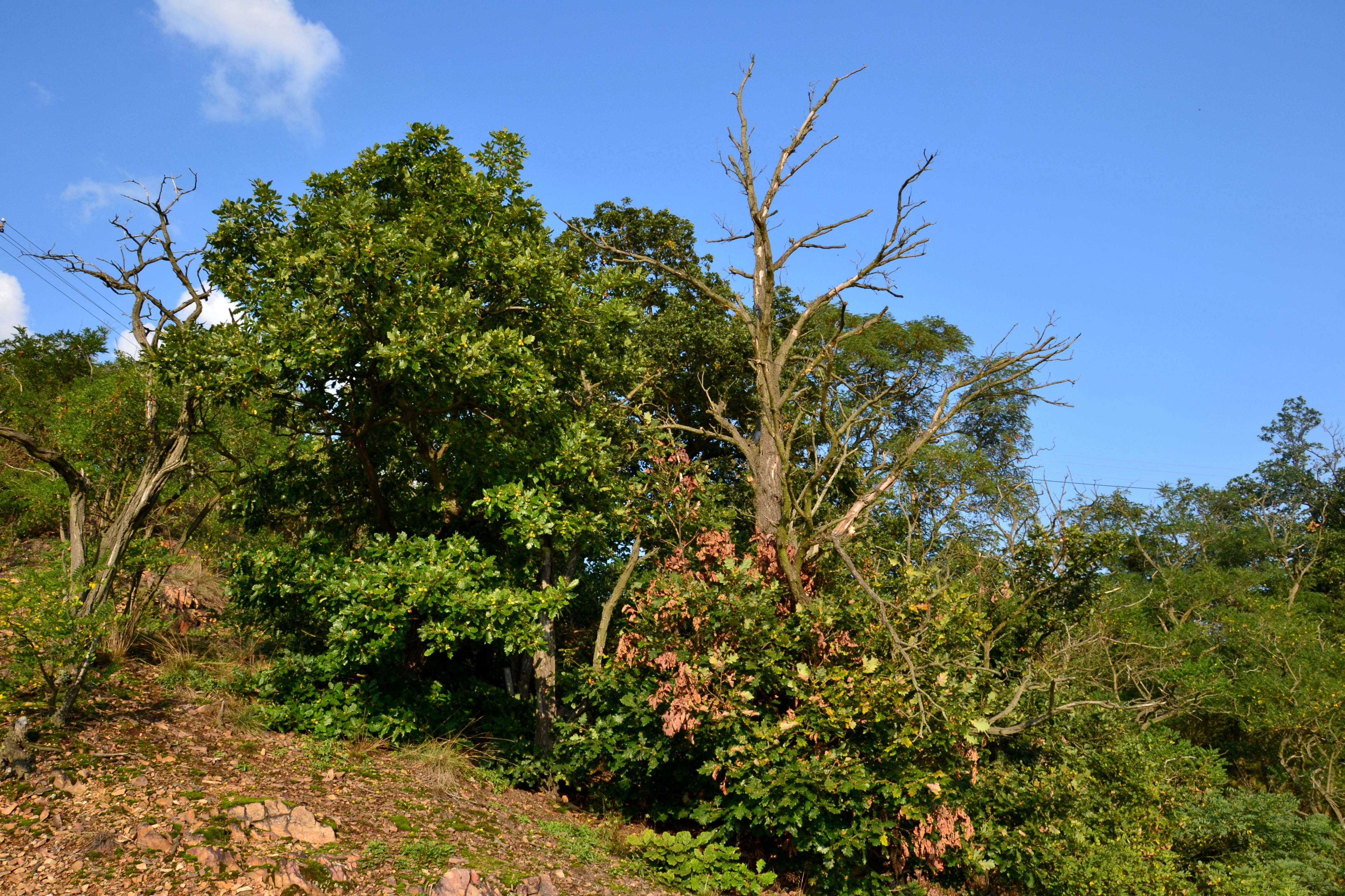 Přírodní památka Želinský meandr - suťový les u vyhlídky nad jezem